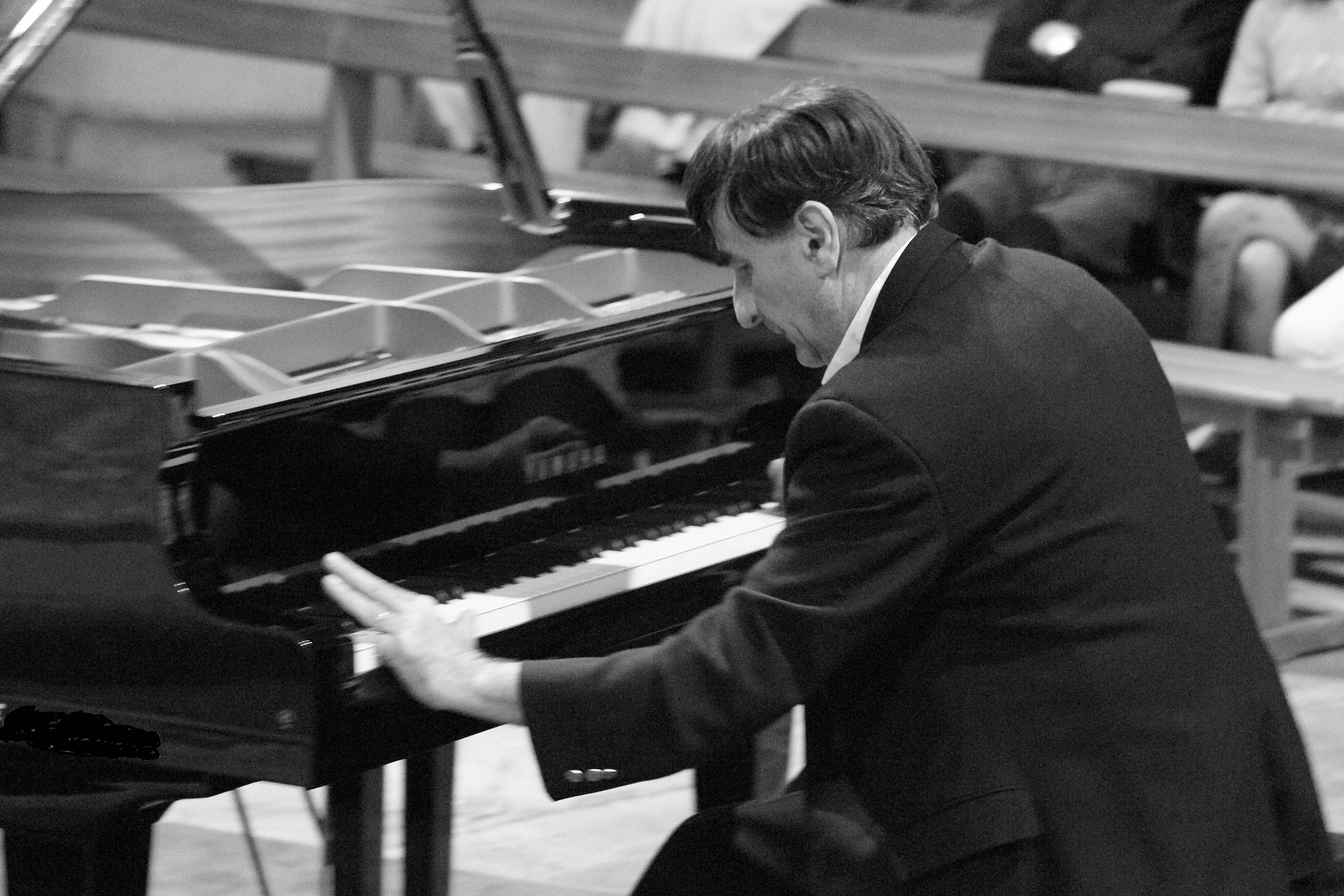 Jean-Gabriel Ferlan